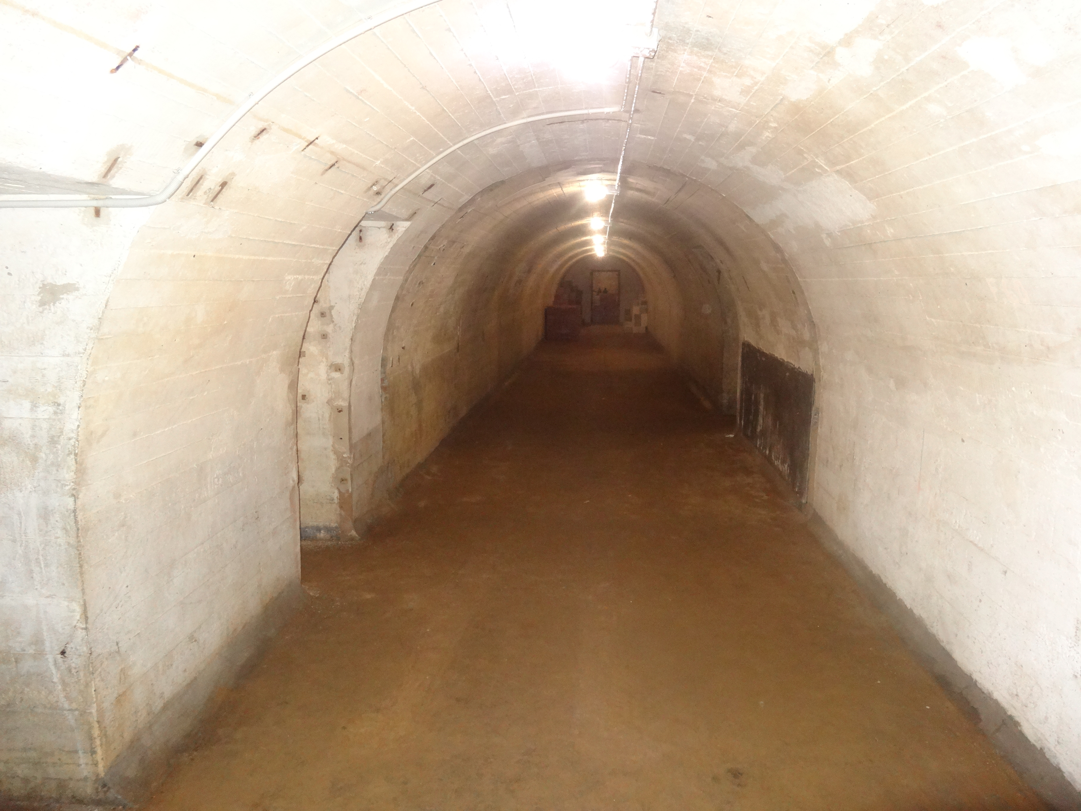 Segona nau del refugi antiaeri de l'Antiga Fàbrica Elizalde, a Barcelona. S'ha conservat al soterrani dels edificis del Complex Elizalde. S'hi accedeix per l'escala del carrer Bailen 166.